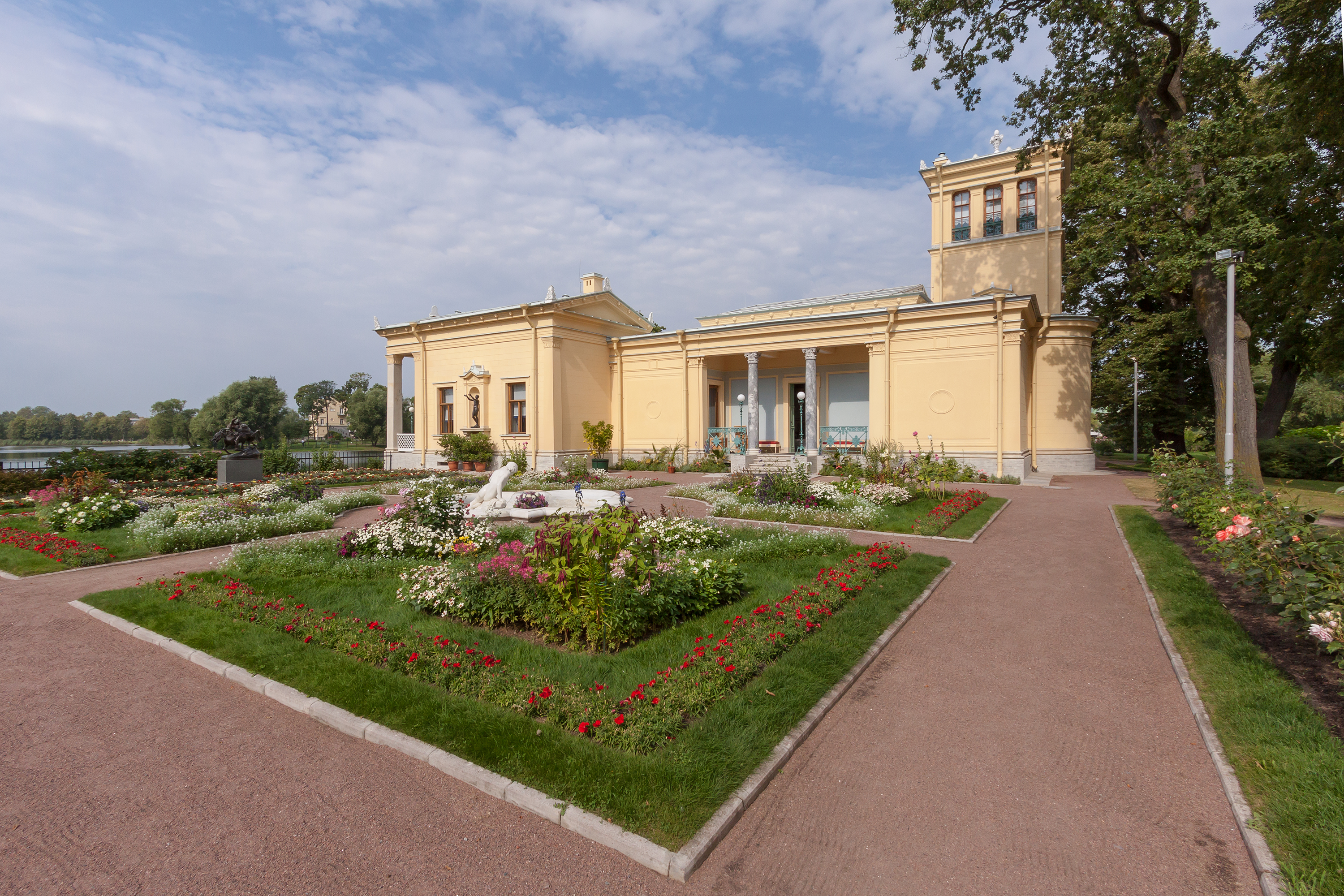 Царицын павильон: Царицын остров, Петергоф, Петродворцовый район, Санкт-Петербург